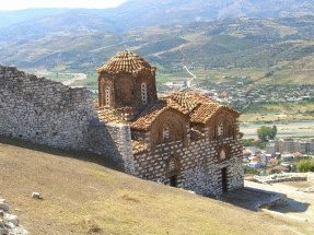 église de la Sainte-Trinité datant du XIIIème siècle à Berat